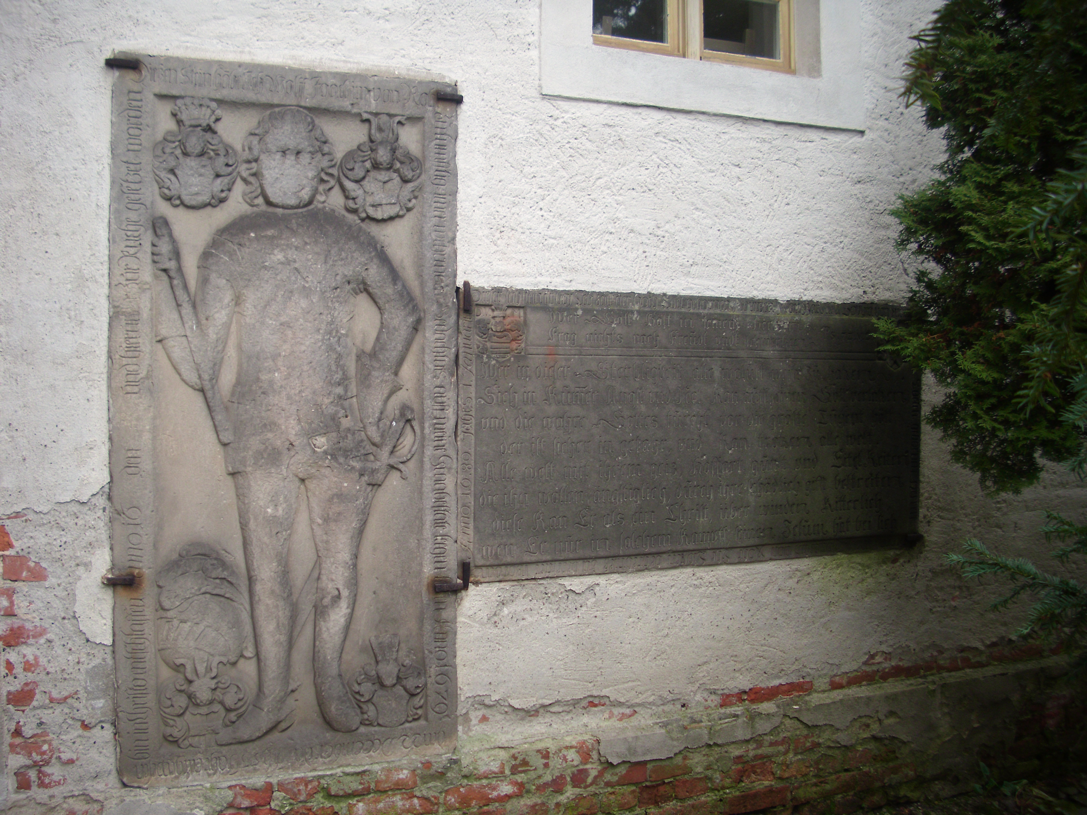 Grabplatte an der Kirche, Familie von Rohr Ragow, Gemeinde Ragow-Merz im Landkreis Oder-Spree, Brandenburg